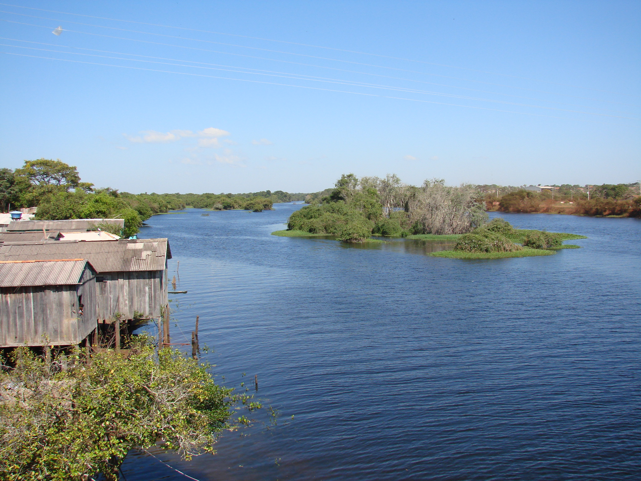 Rio Guaporé, passando pela cidade de VILA BELA DA SANTÍSSIMA TRINDADE-MT